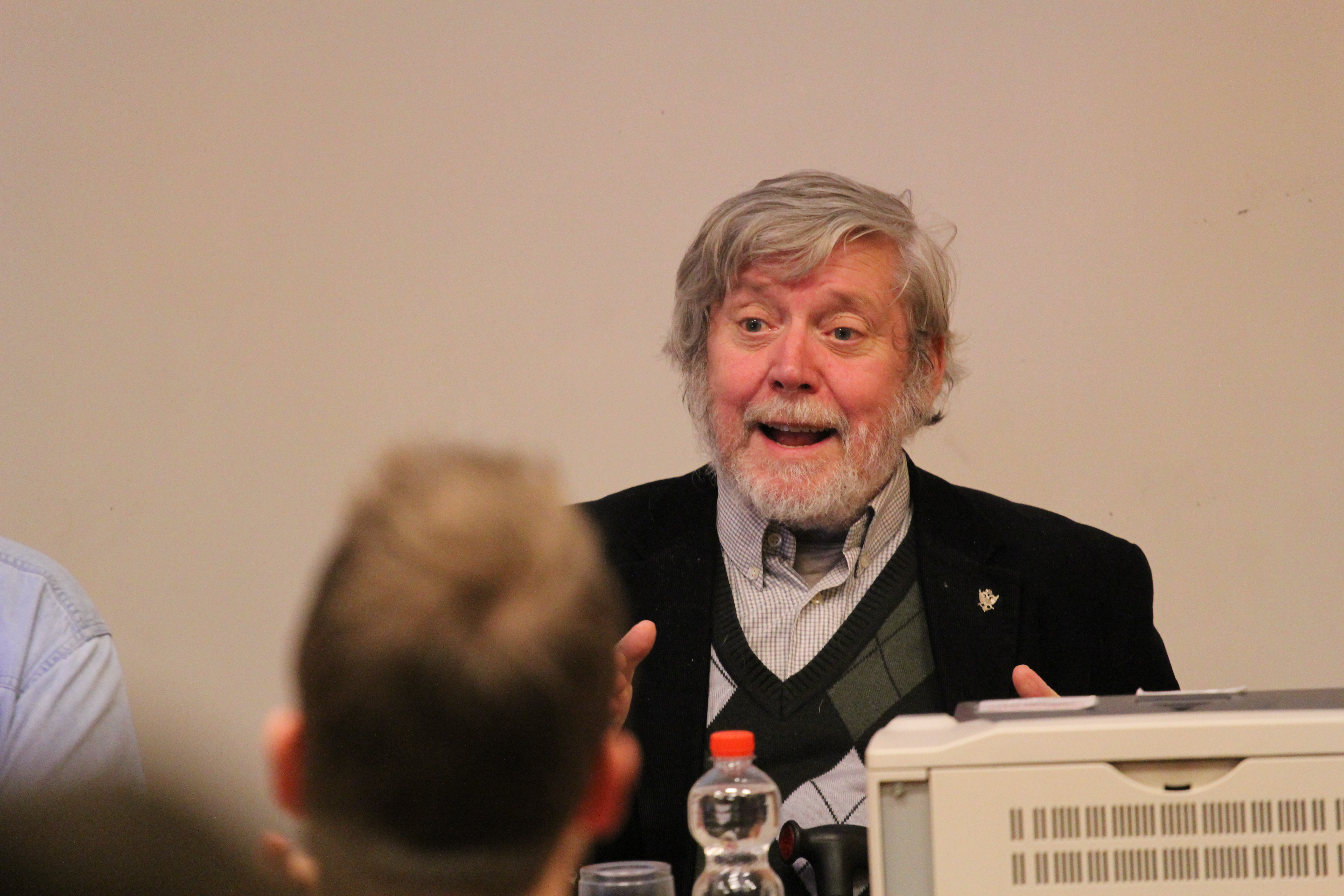 Historik Jiří Rak na komentovaném promítání filmů o Švejkovi (2017)